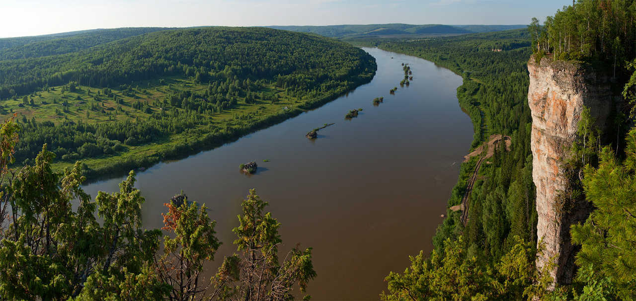 Ветлан, Красновишерский район This image is related to the protected area of Russia number 5910184